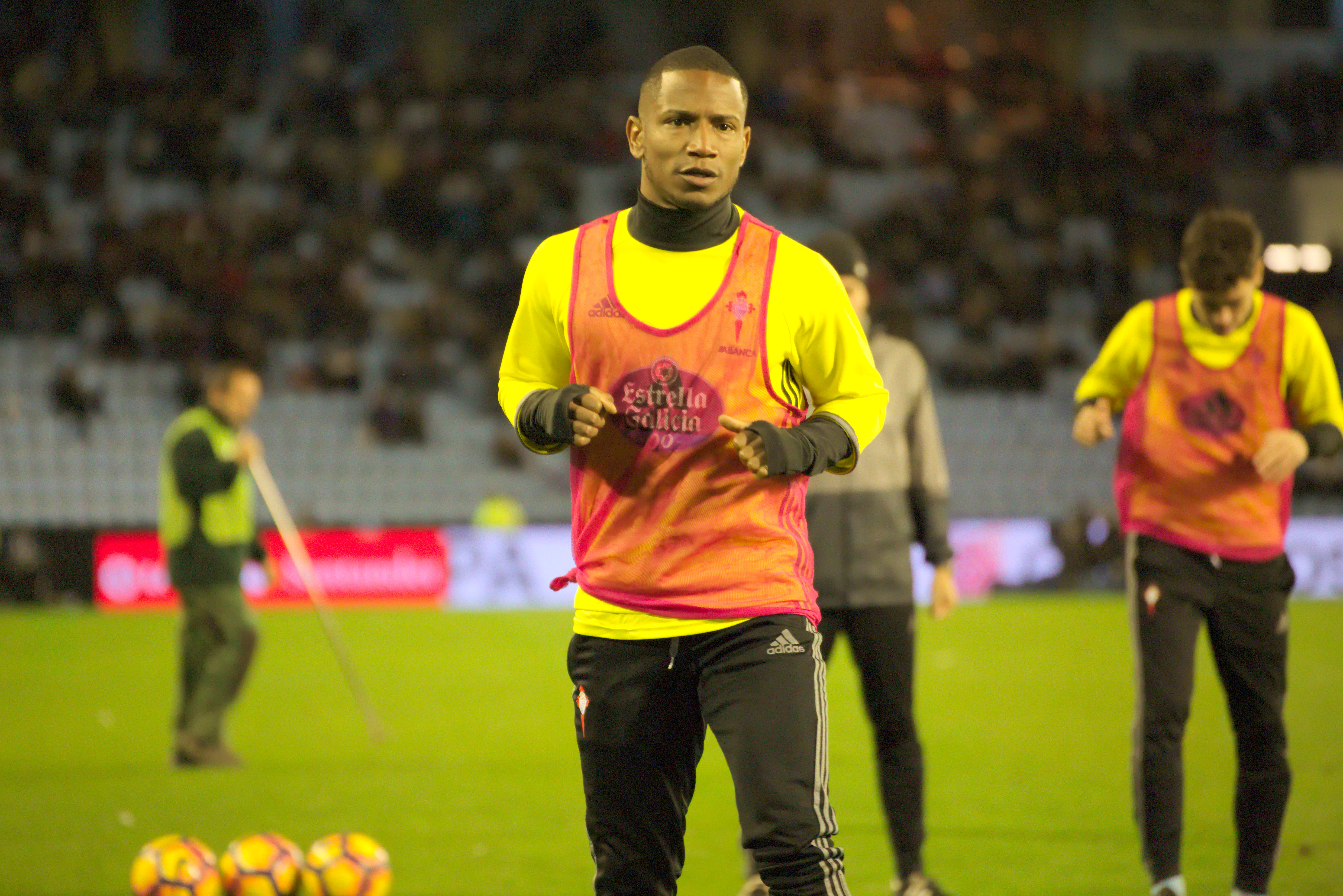 Claudio Beauvue - RC Celta de Vigo